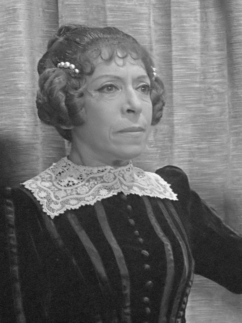 TV-feuilleton "Ritmeester Buat". Caro van Eijck 29 augustus 1968